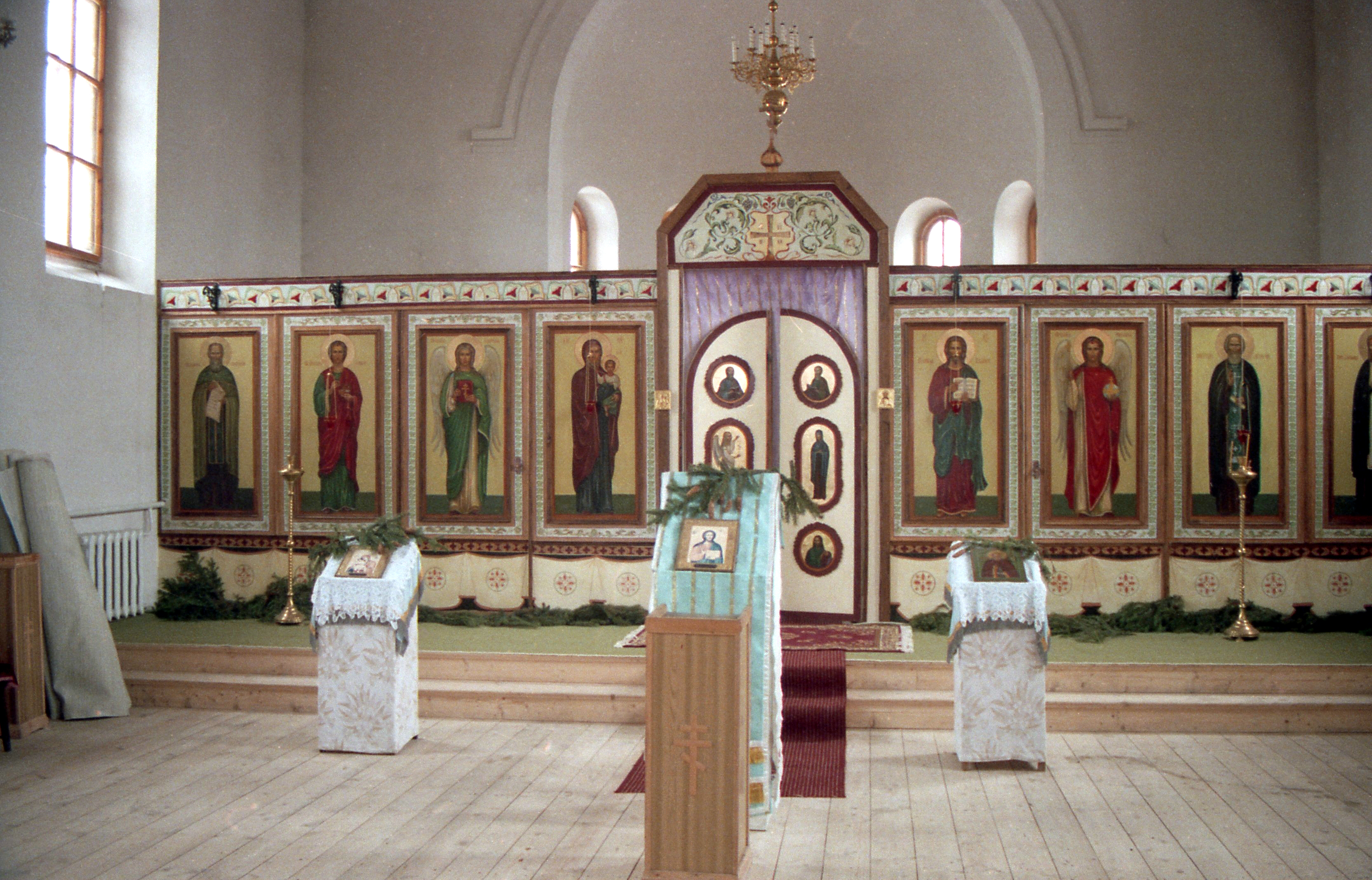 Altarraum der russisch-orthodoxe (Sergius-) Kirche in Rossitten (Rybatschi)